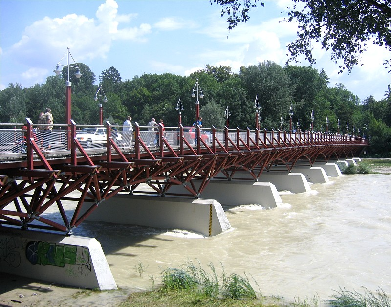 Thalkirchner Bruecke ueber die Isar in Muenchen.